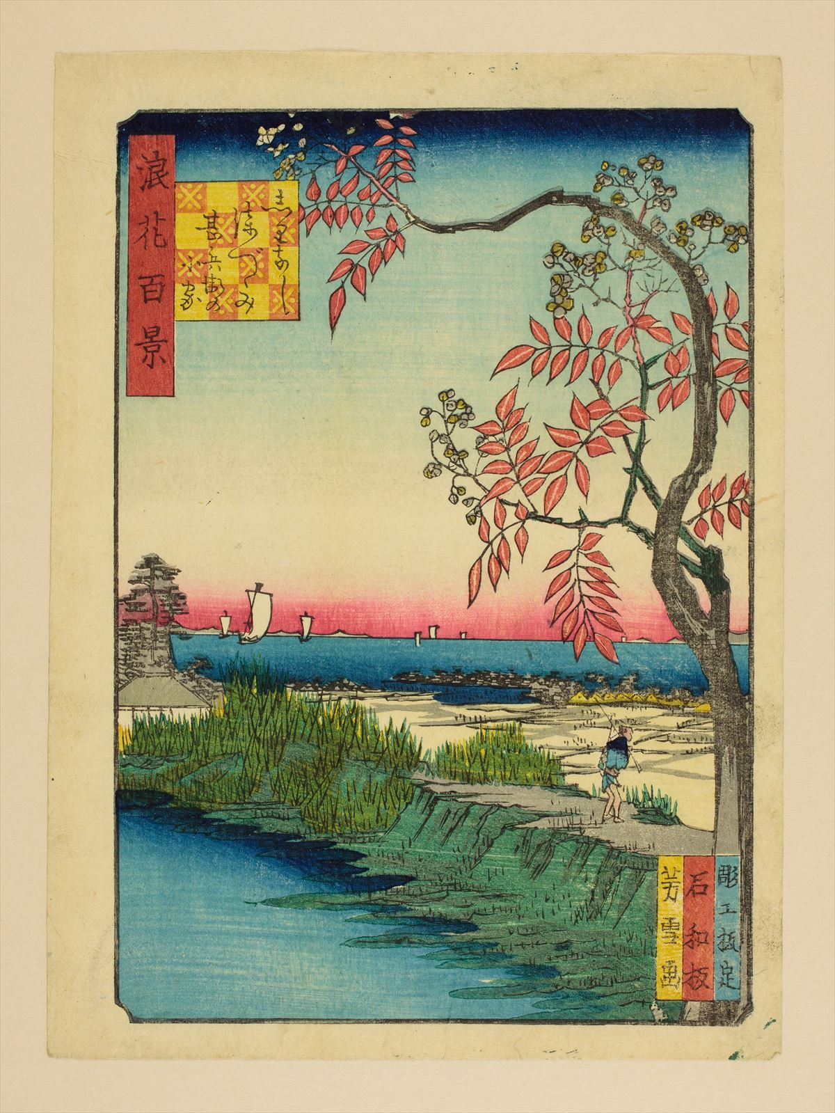 1800年代。南粋亭芳雪/画。浪花百景 102枚のうちの1枚。大阪市立中央図書館蔵。